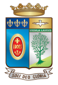 ตราสัญลักษณ์คณะอุร์สุลินฯ